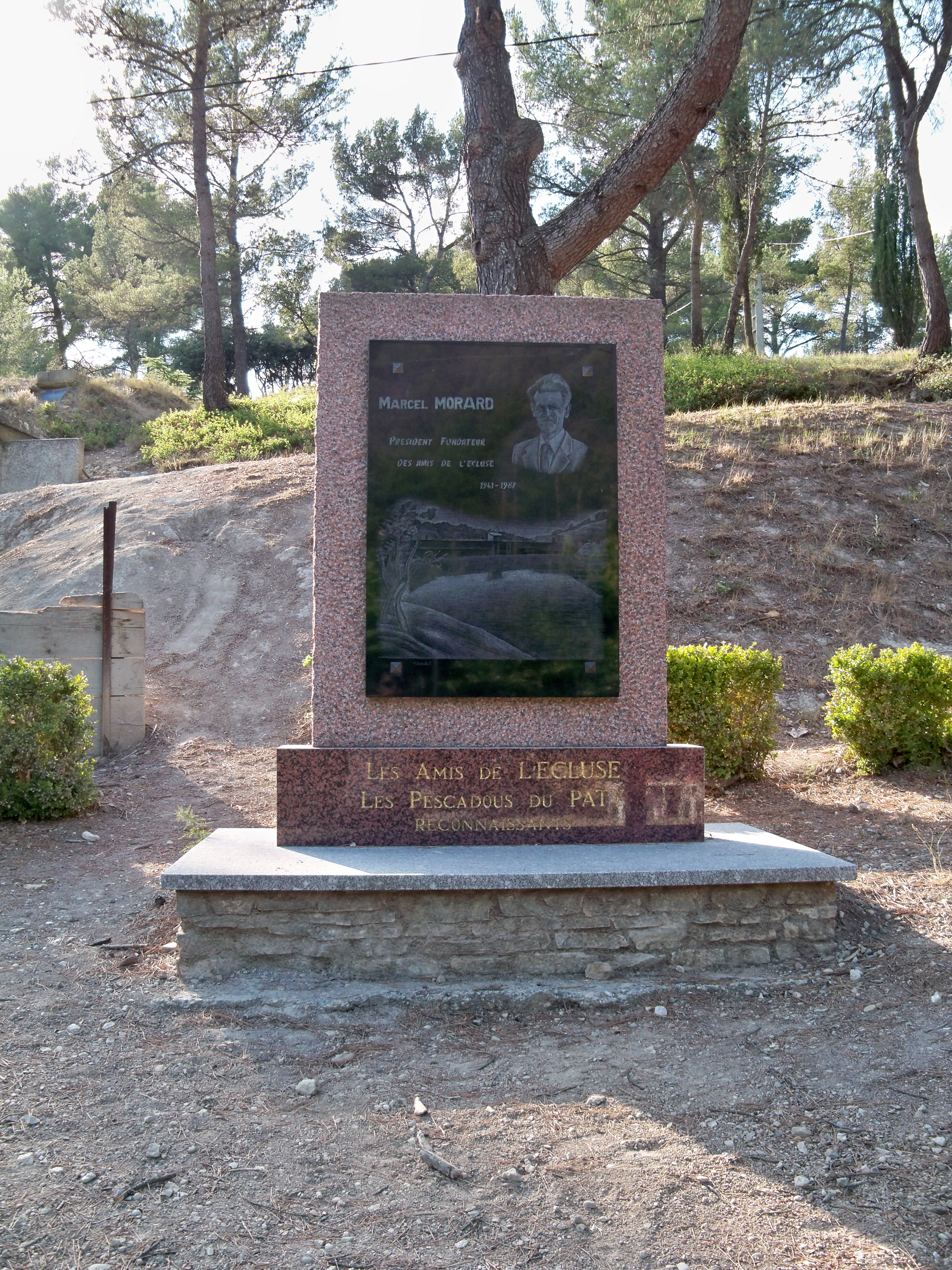 Stèle en mémoire du révérand Morand, Créateur du Lac du Paty, Caromb, Vaucluse, France